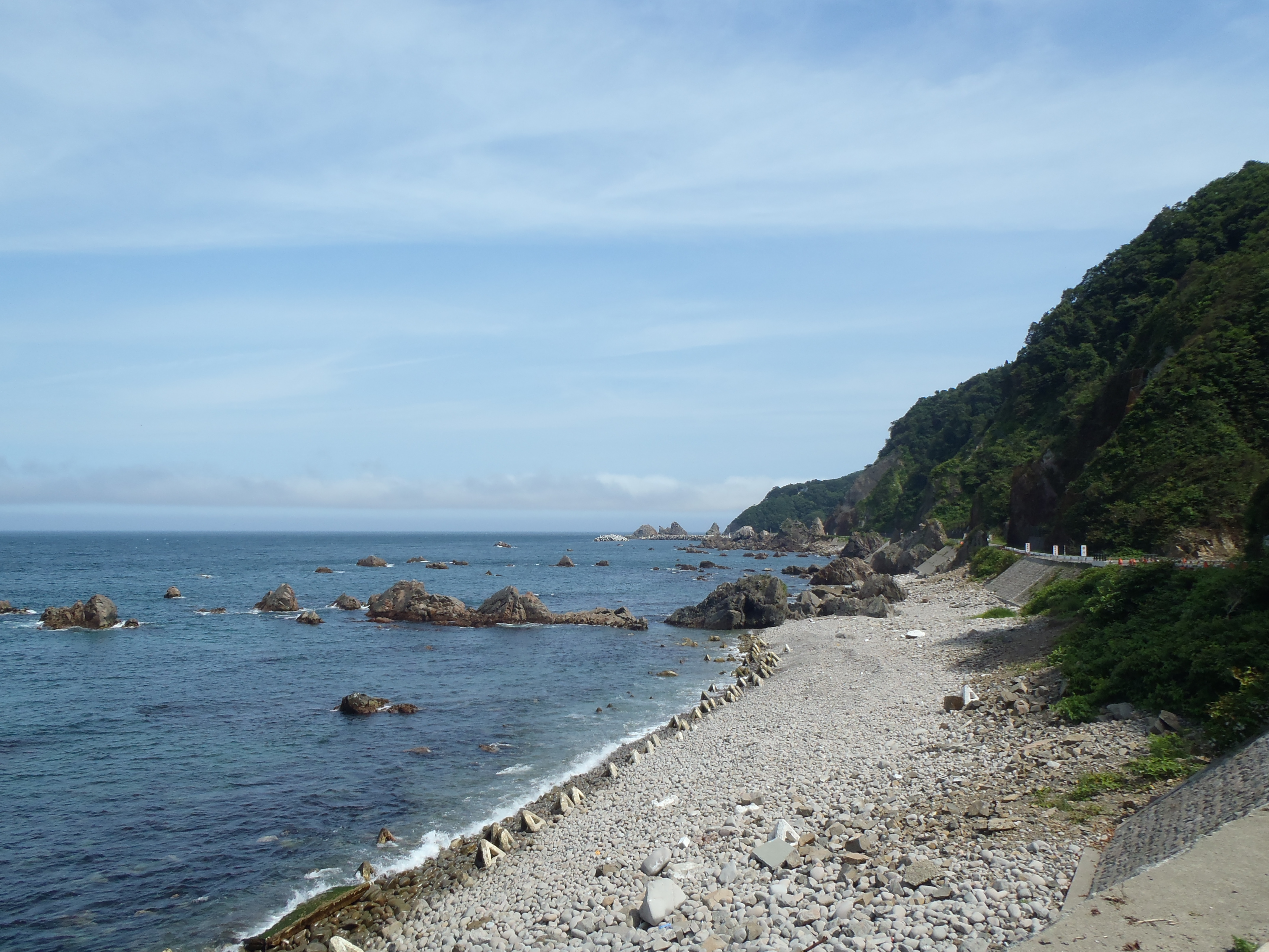 小袖海岸。2011年8月4日撮影。